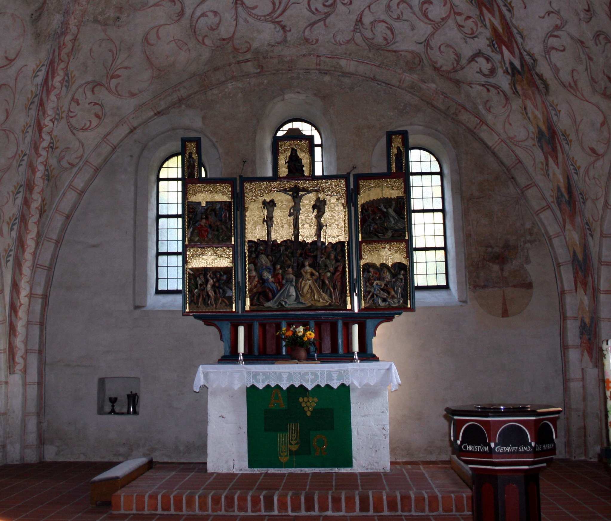 Flügelaltar in der Kirche Alt-Stuhr